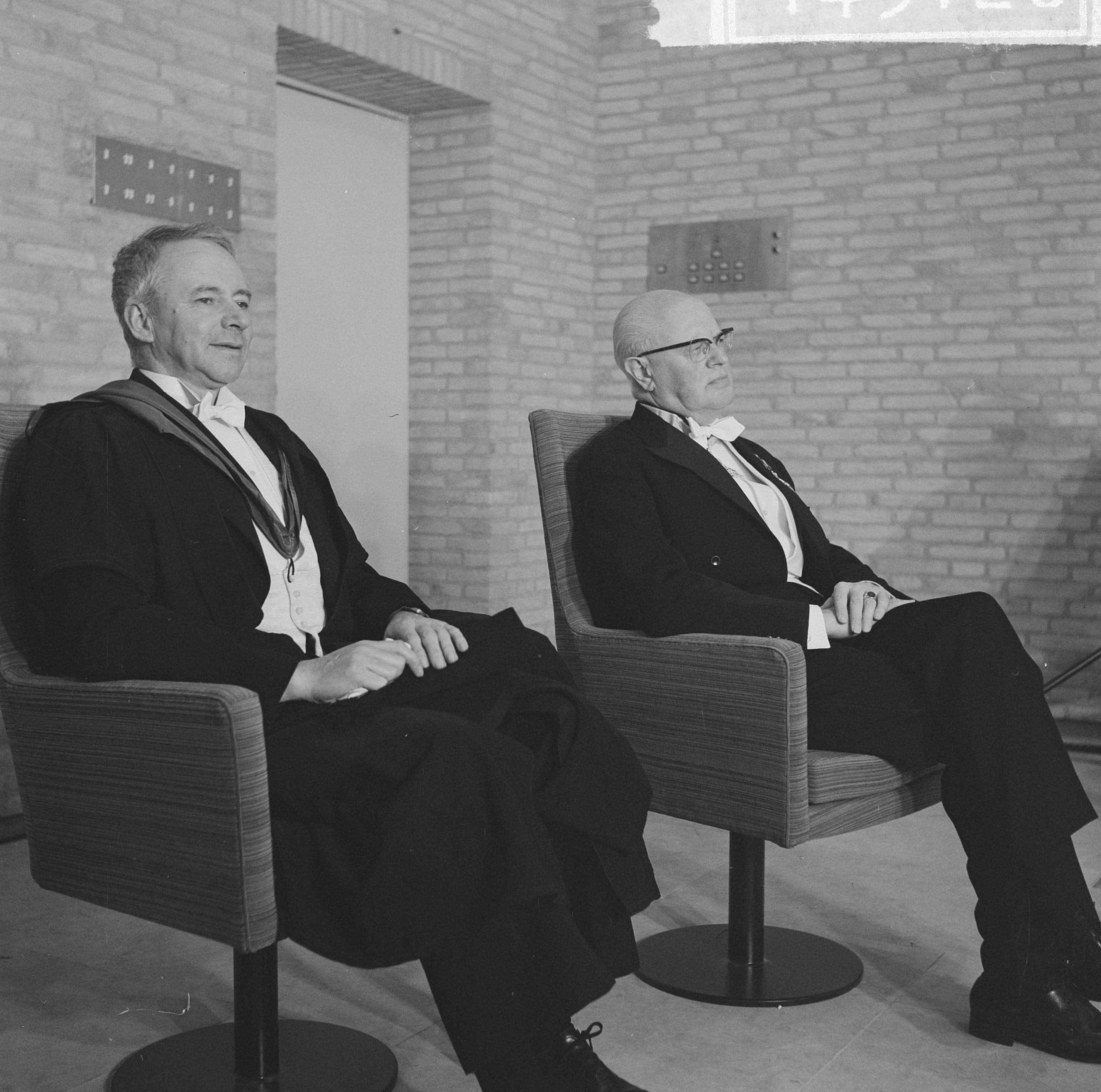 Collectie / Archief : Fotocollectie Anefo Reportage / Serie : [ onbekend ] Beschrijving : Eredoctoraten in Tilburg, links Colin Clarke en rechts mr. Romme Datum : 15 november 1962 Locatie : Noord-Brabant, Tilburg Trefwoorden : eredoctoraten, universiteiten Persoonsnaam : Clark, Colin, Romme, C.P.M. Fotograaf : Nijs, Jac. de / Anefo Auteursrechthebbende : Nationaal Archief Materiaalsoort : Negatief (zwart/wit) Nummer archiefinventaris : bekijk toegang 2.24.01.03 Bestanddeelnummer : 914-5126